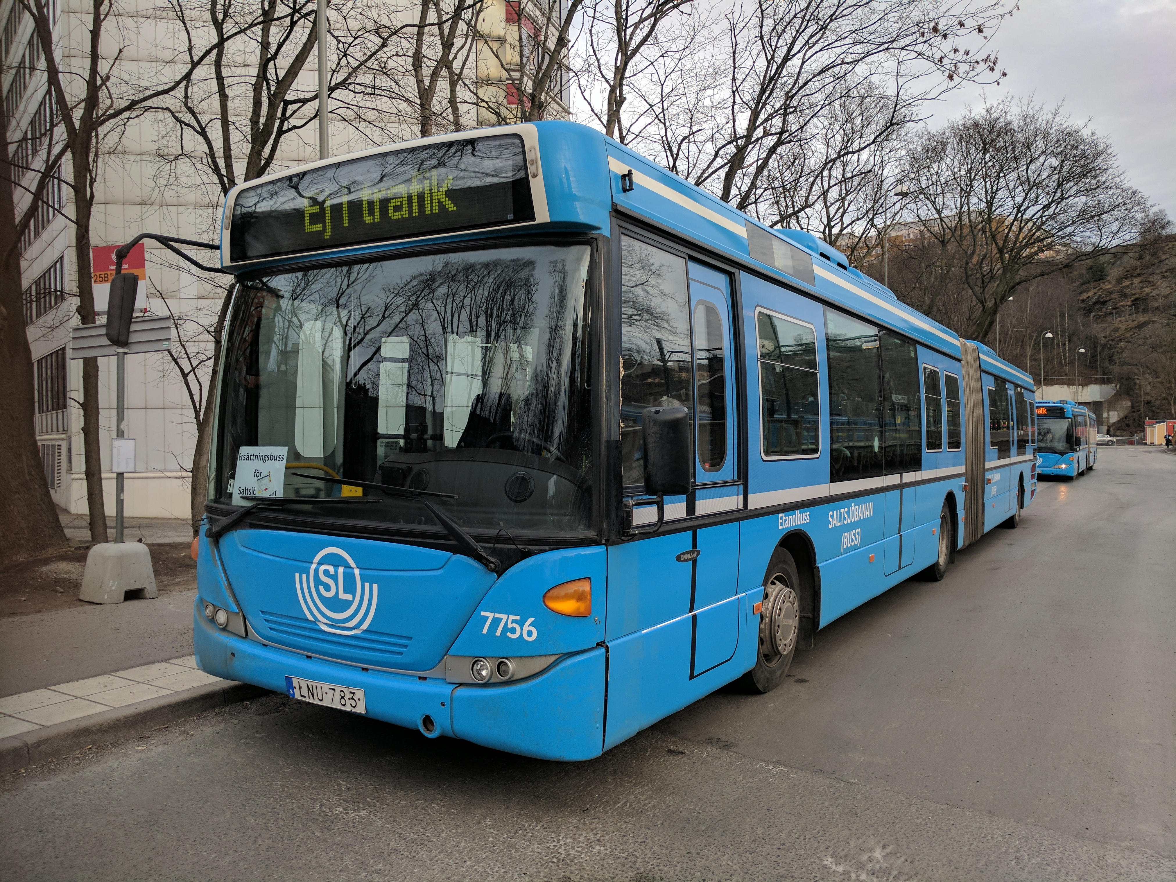 Saltsjöbanan - Henriksdal - 16 March 2017